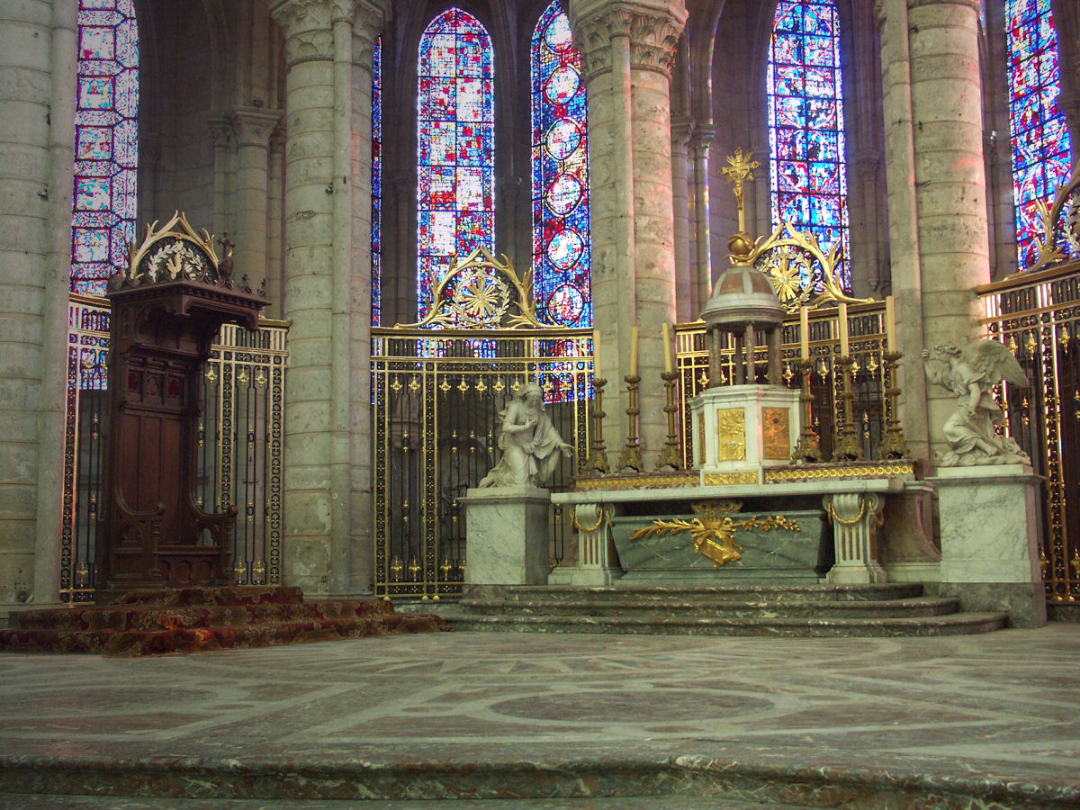 Cathédrale Saint-Gervais-et-Saint-Protais de Soissons, France - High altar